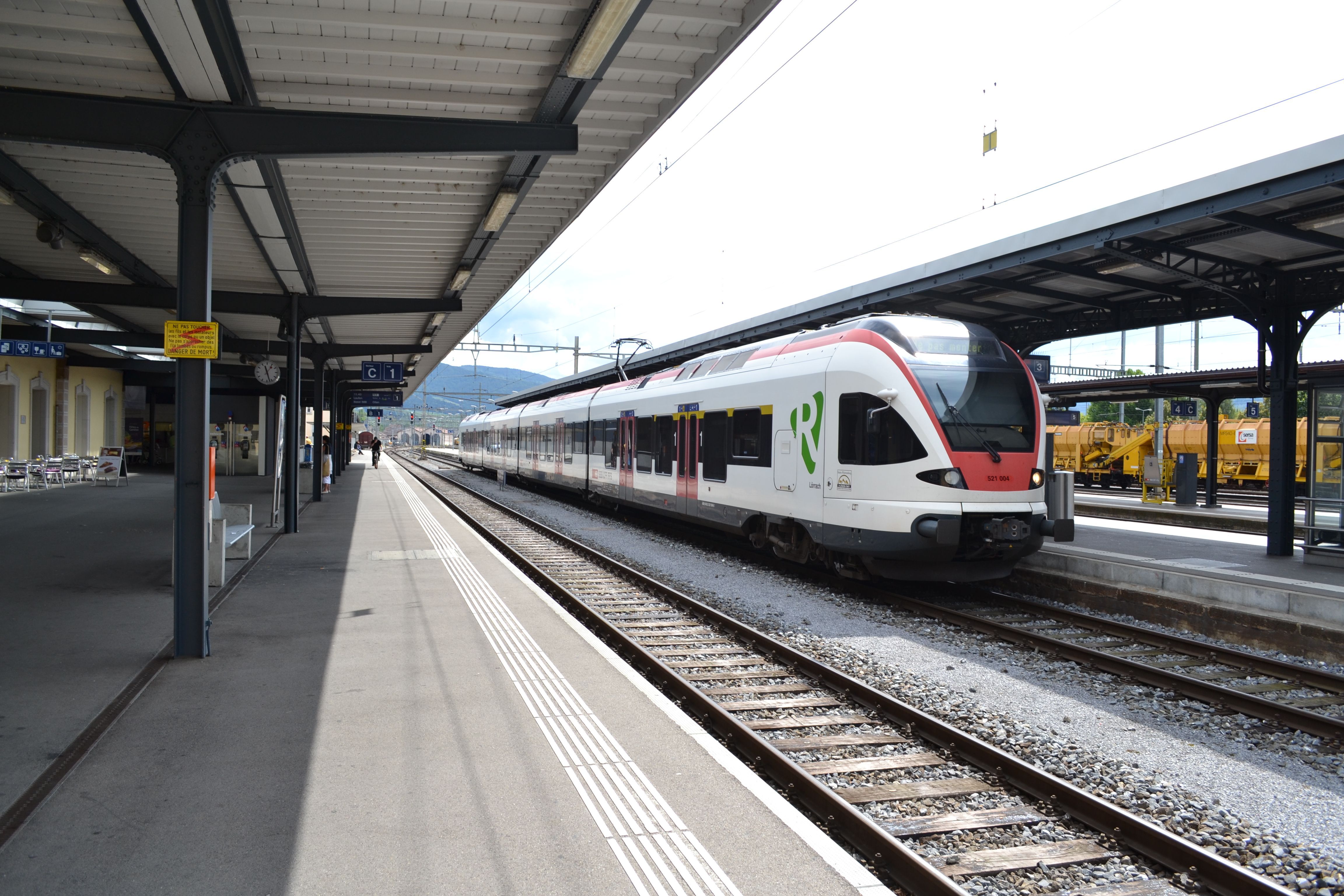 Quais 1 et 2 de la gare de Delémont avec rame Flirt RABe de la Ligne S3 du Regio S-Bahn.